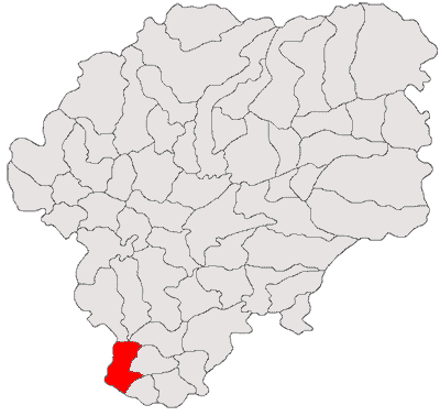 Categorie:Hărţi ale judeţului Bistriţa-Năsăud